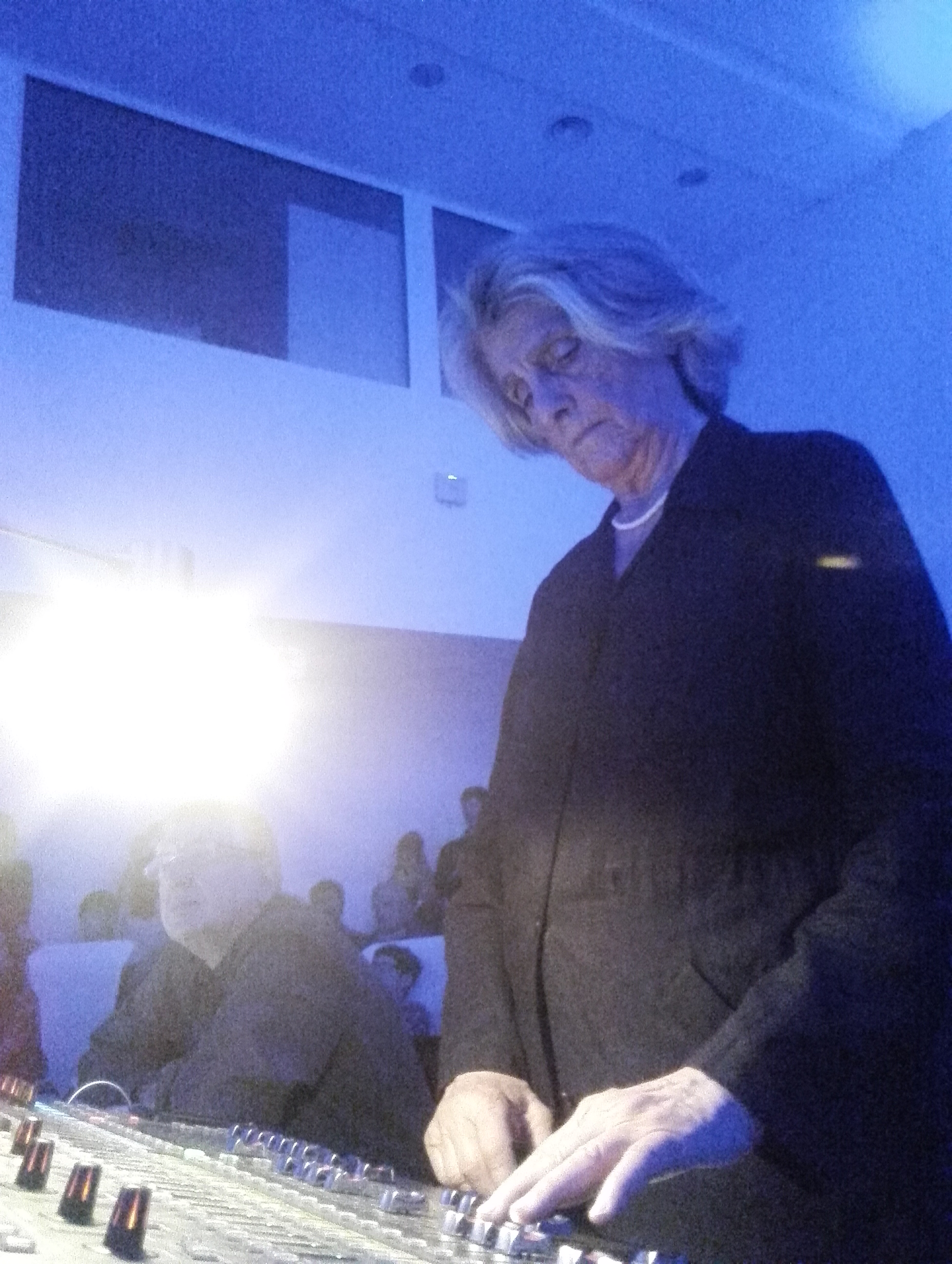 Festival Zeppelin 2015 CCCB @ Barcelona Organiza: Orquesta del Caos. Concierto acusmático: De Natura Sonorum, Bernard Parmegiani. 1975 Espacialización de Beatriz Ferreyra. De Natura Sonorum cuyo título remite a De rerum natura de Lucrecio, explora también la multiplicidad de las posibilidades sonoras. Esta obra profusa, con un sinnúmero de descubrimientos e intuiciones deslumbrantes, ha influido en varias generaciones de compositores y sigue siendo una pieza verdaderamente seminal en el paisaje sonoro de la música experimental.